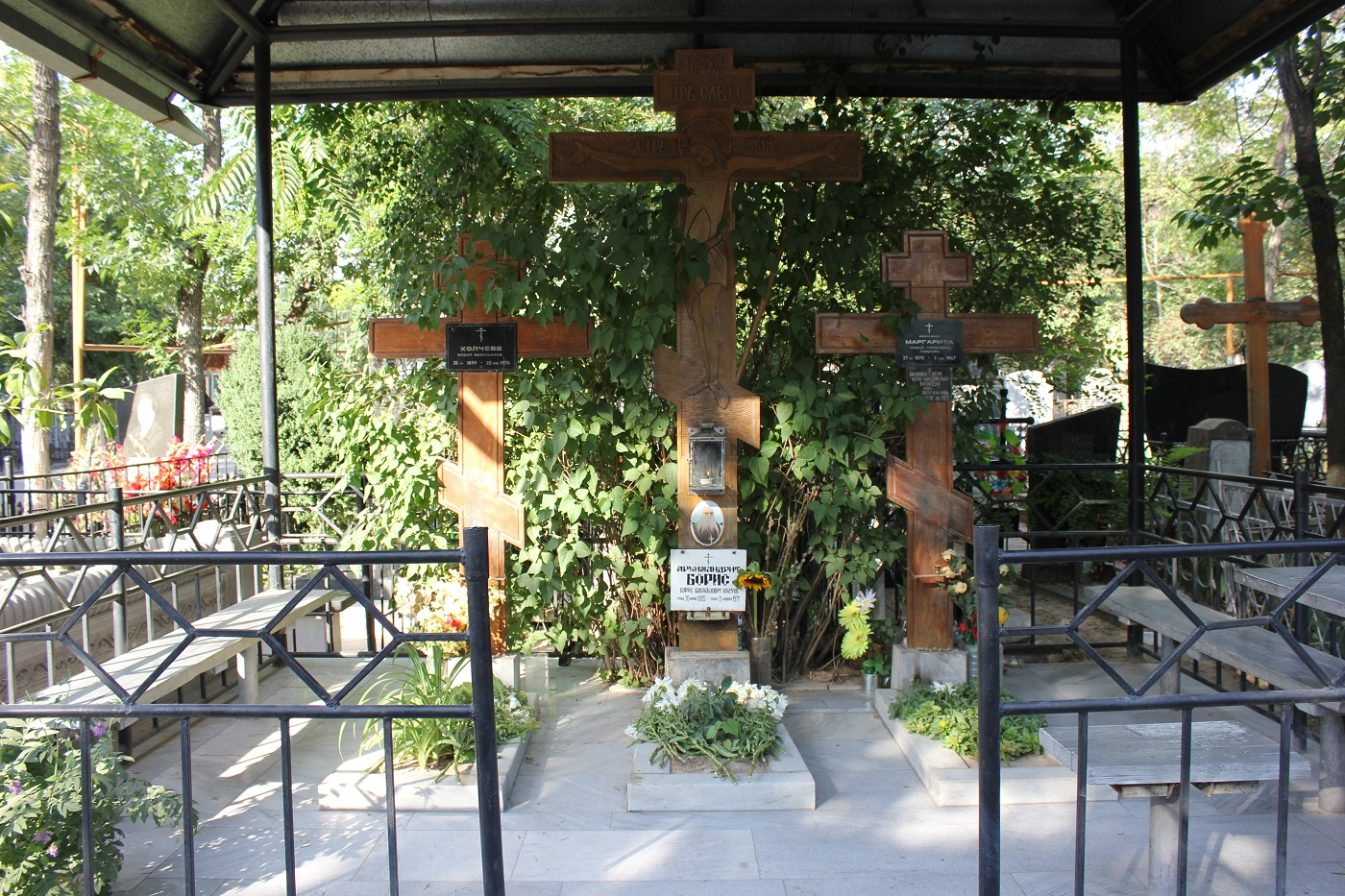 Место захоронения на Боткинском кладбище г. Ташкента (Узбекистан) архимандрита Бориса (Холчева)